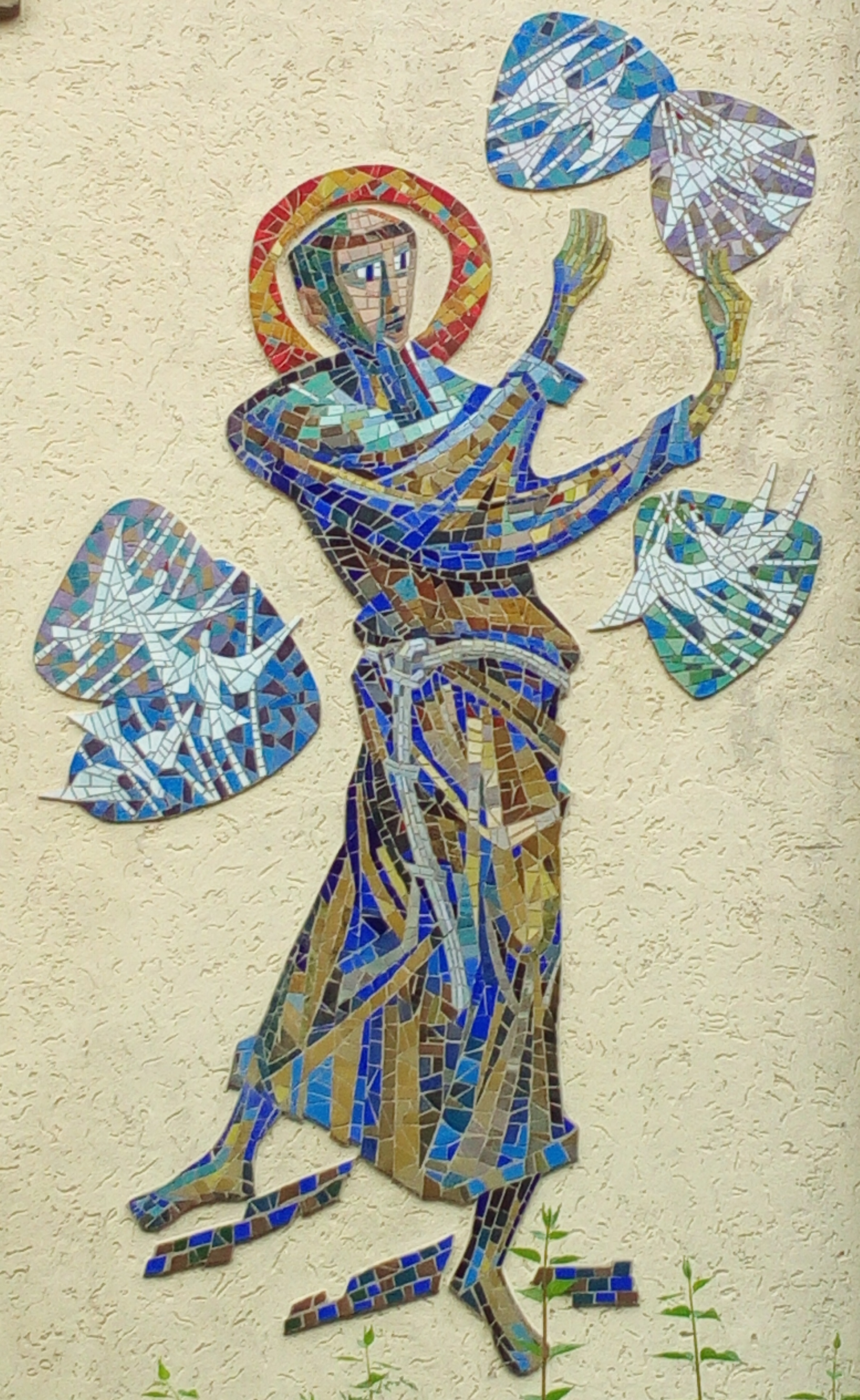 Mosaik des Heiligen Franziskus an der Kindertagesstätte der Gemeinde Sancta Familia in Frankfurt-Ginnheim